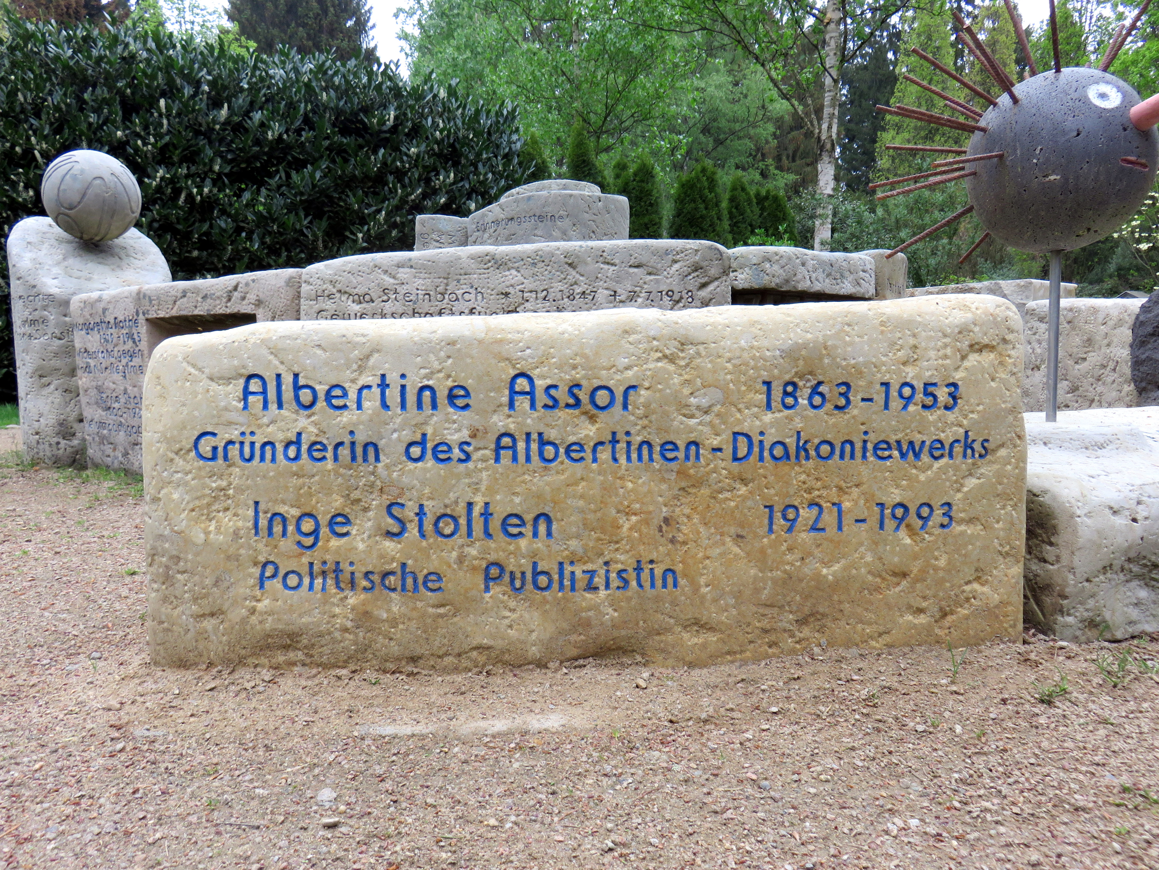 Gedenkstein für die Hamburger Gründerin des Albertinen-Diakoniewerkes Albertine Assor sowie für die deutsche politische Publizistin Inge Stolten in der Erinnerungsspirale im Bereich des Gartens der Frauen auf dem Ohlsdorfer Friedhof in Hamburg-Ohlsdorf.